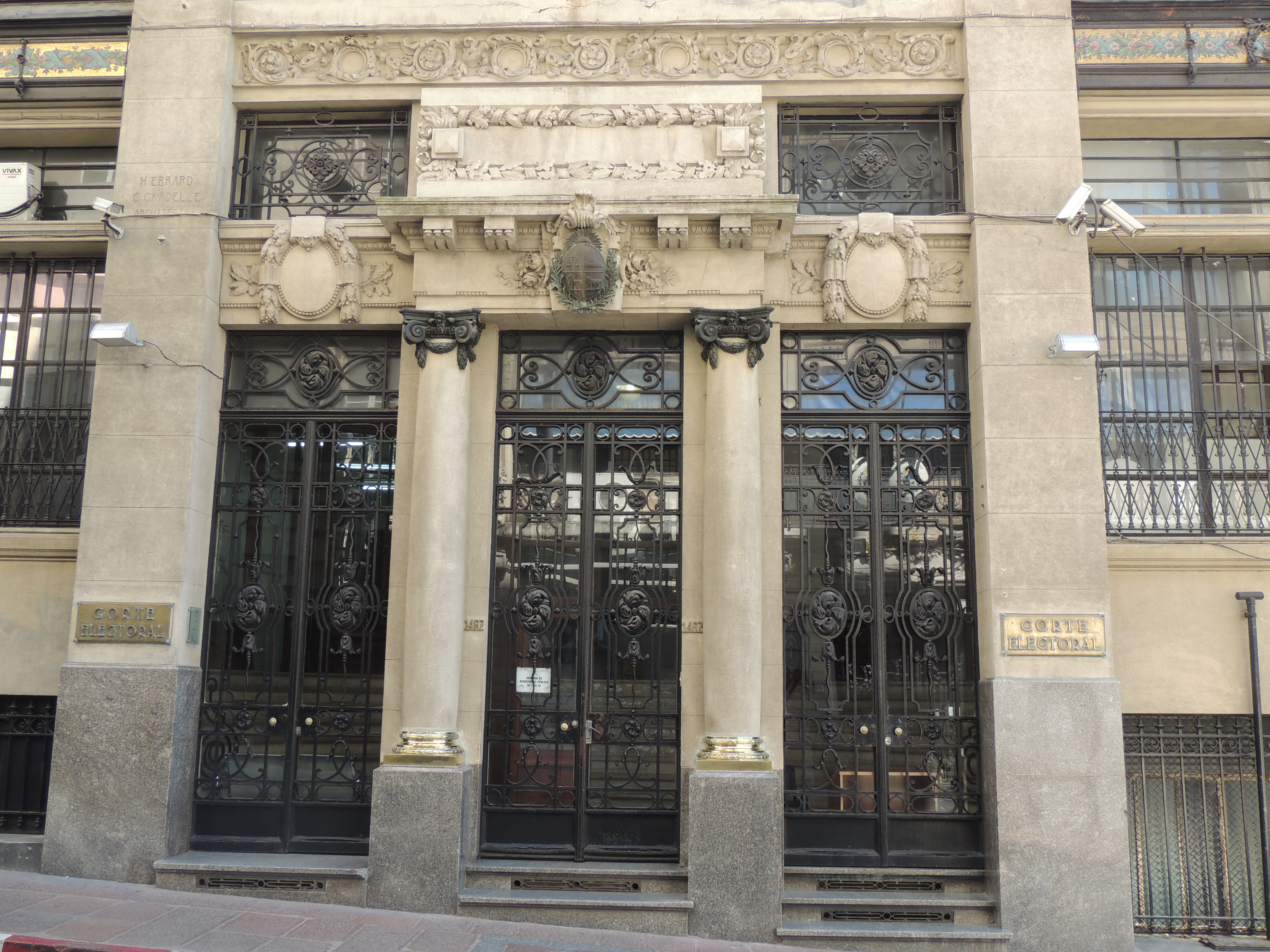 Eingangsportal des Gebäudes des Wahlgerichts ("Corte Electoral") in Montevideo, Uruguay.